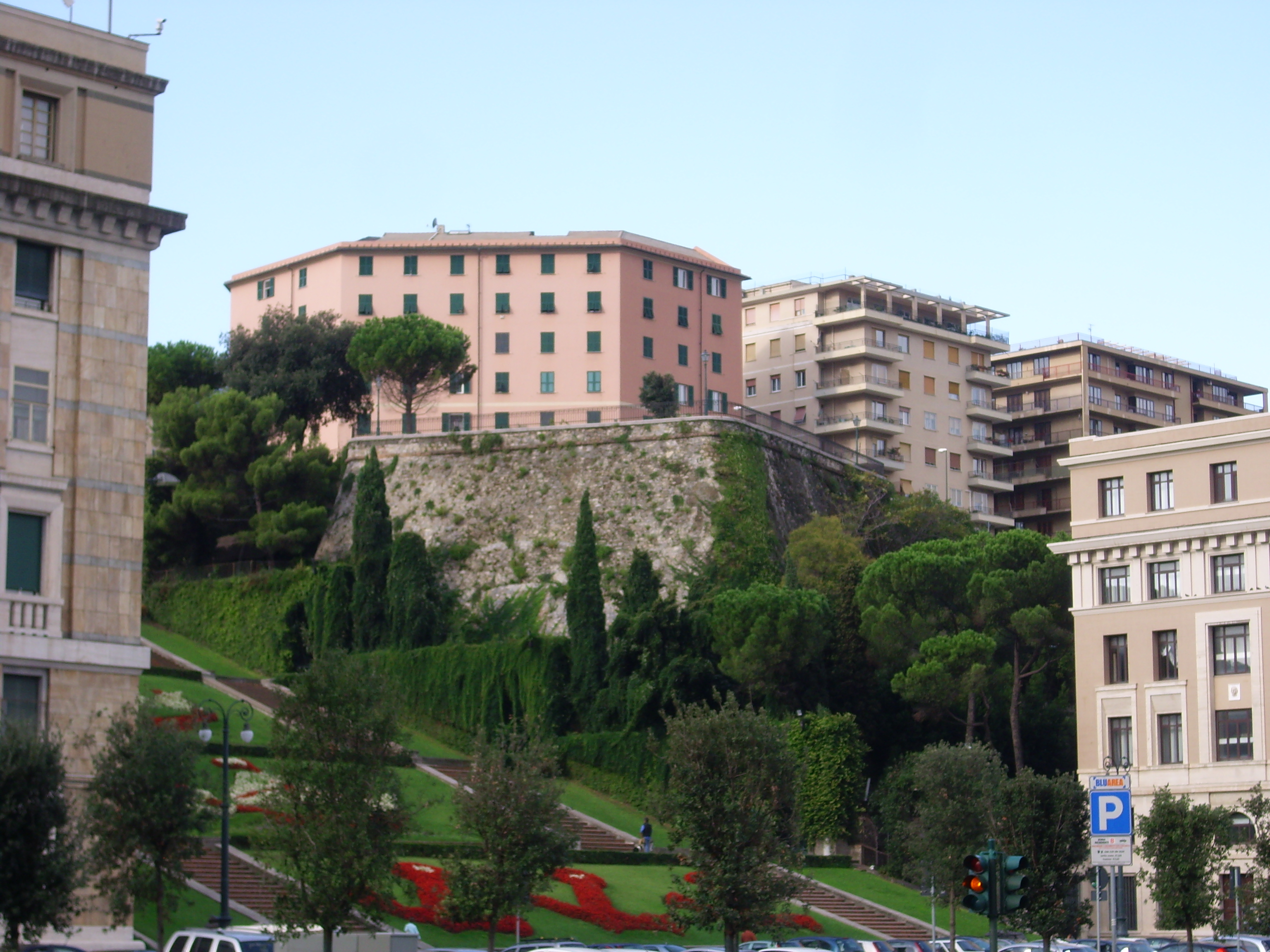 Scorcio con le Mura delle Capuccine, a Genova.